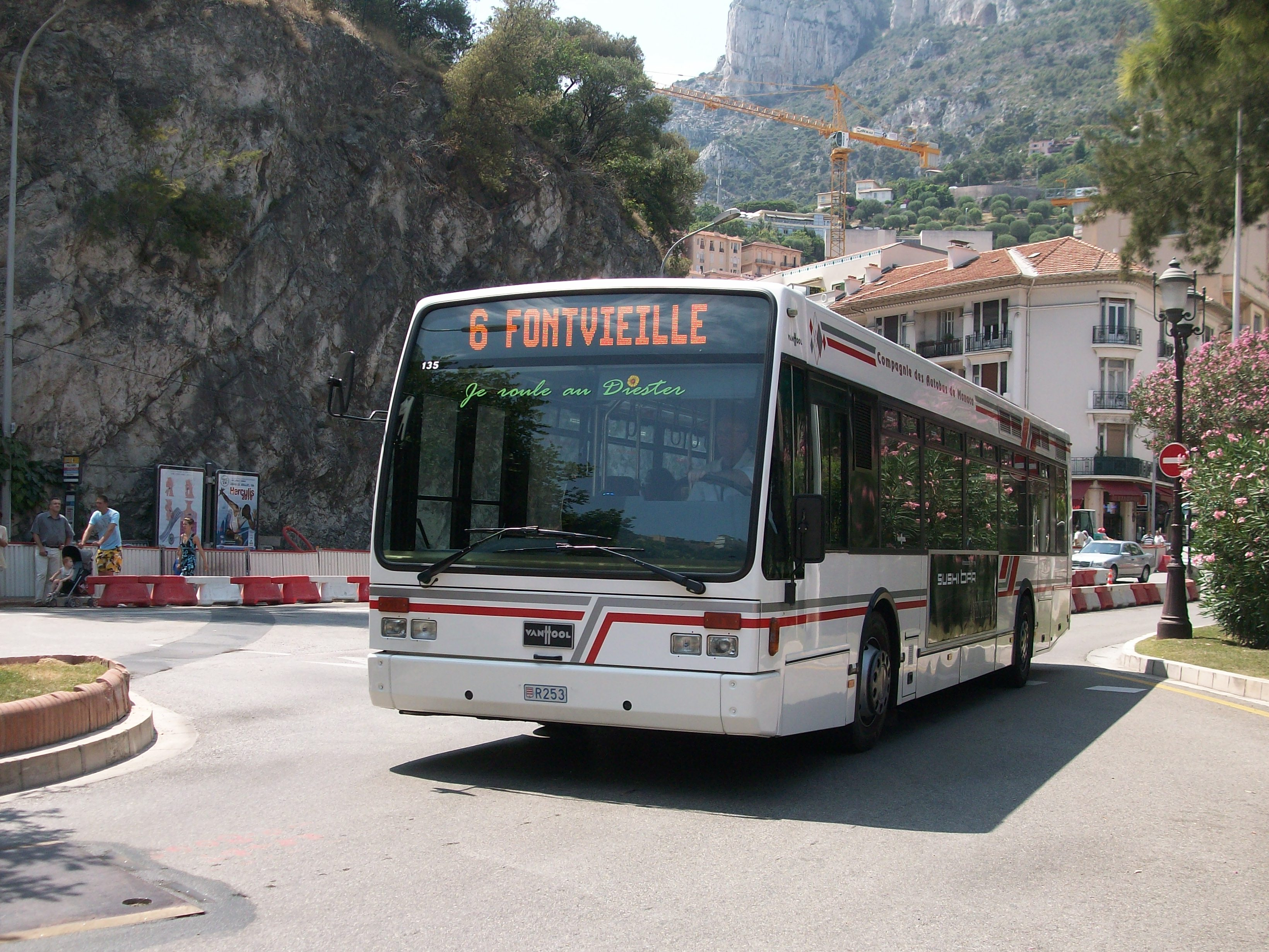 Van Hool A320, CAM, Monaco